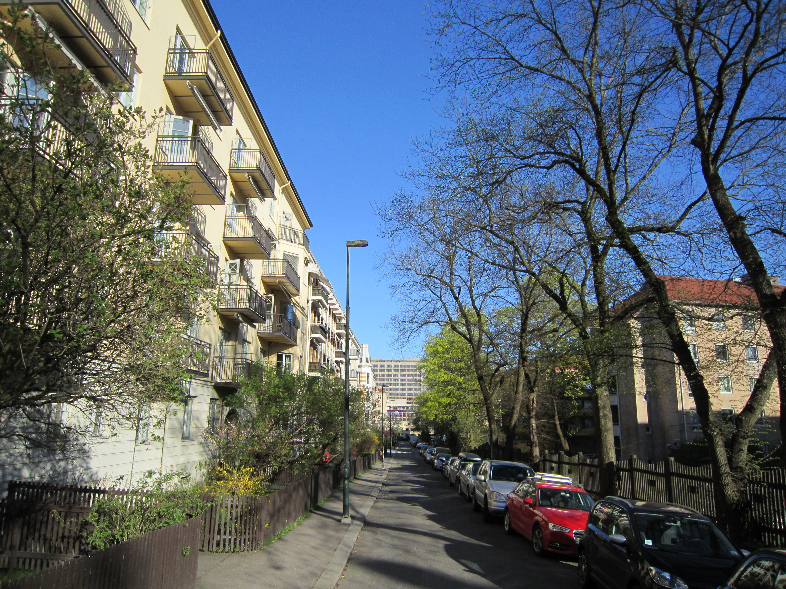 Mogens Thorsens gate sett vestfra